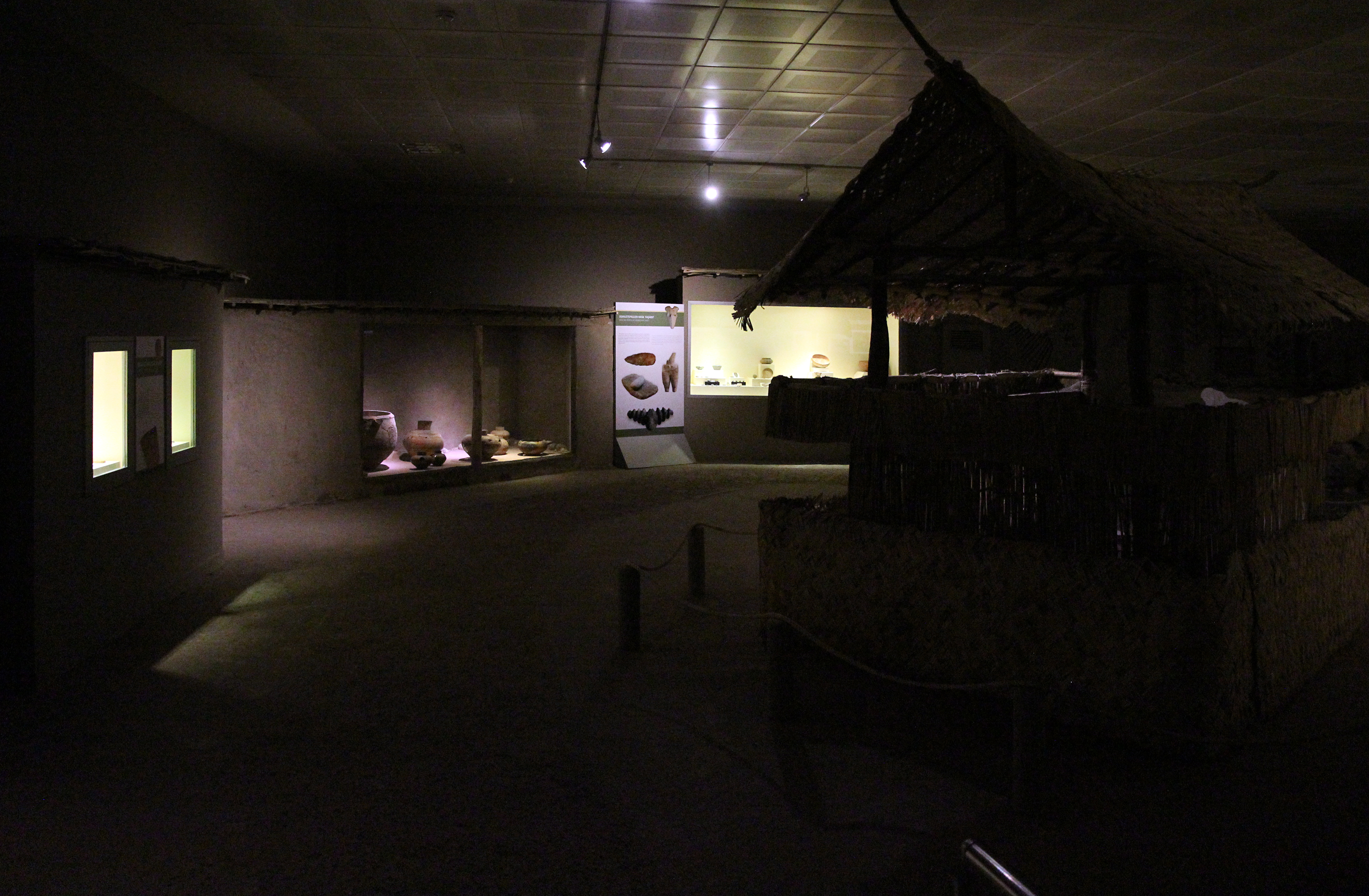 Archäologisches Museum Kahramanmaraş, Türkei, Saal der prähistorischen Funde aus Domuztepe